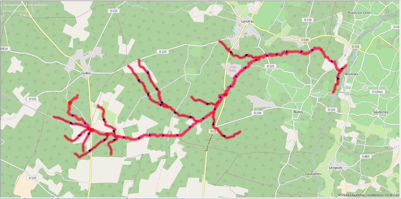 Le Tursan et affluents This map may be incomplete, and may contain errors. Don't rely solely on it for navigation.